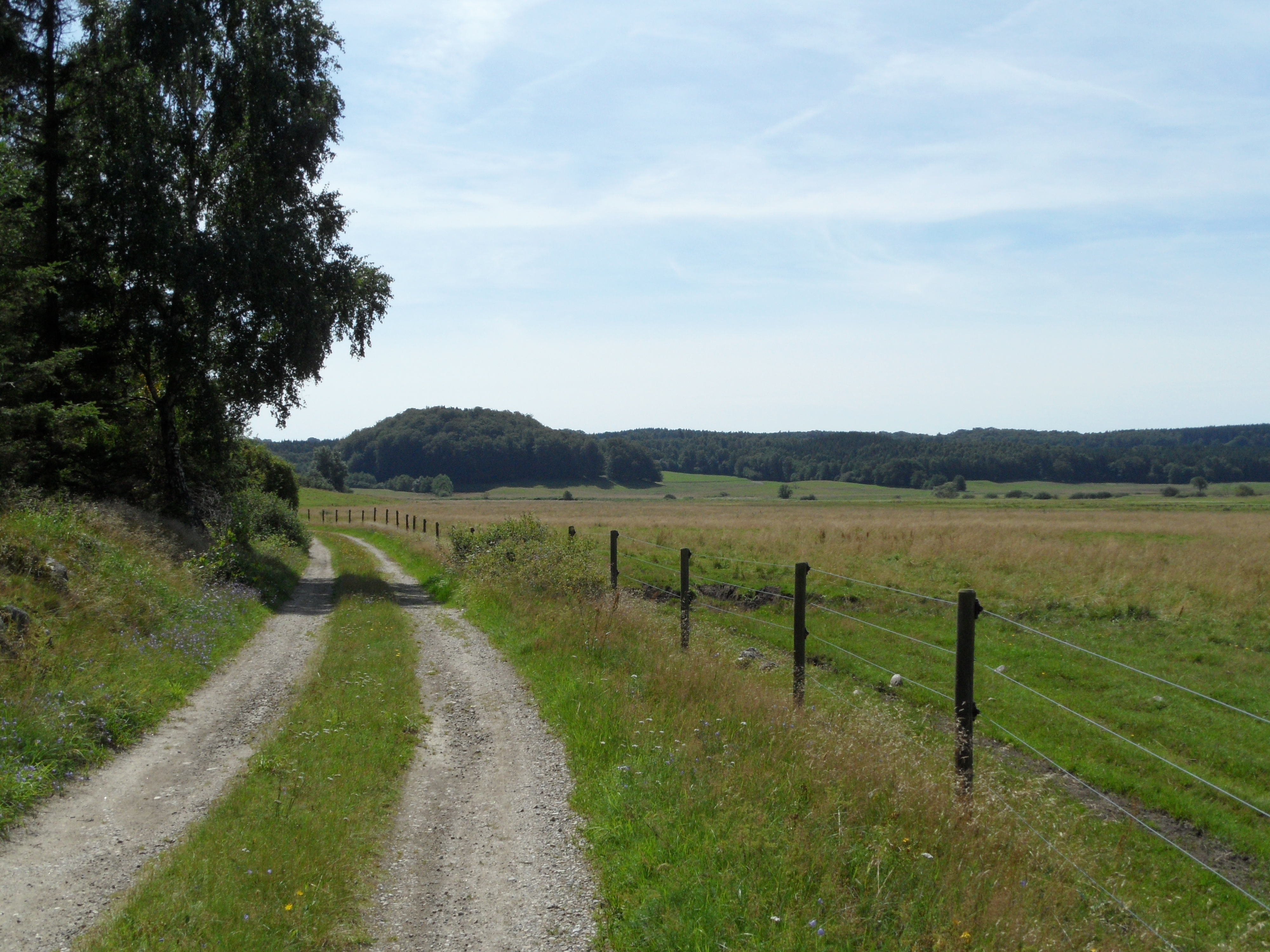 Naturreservatet Navröd betesmark